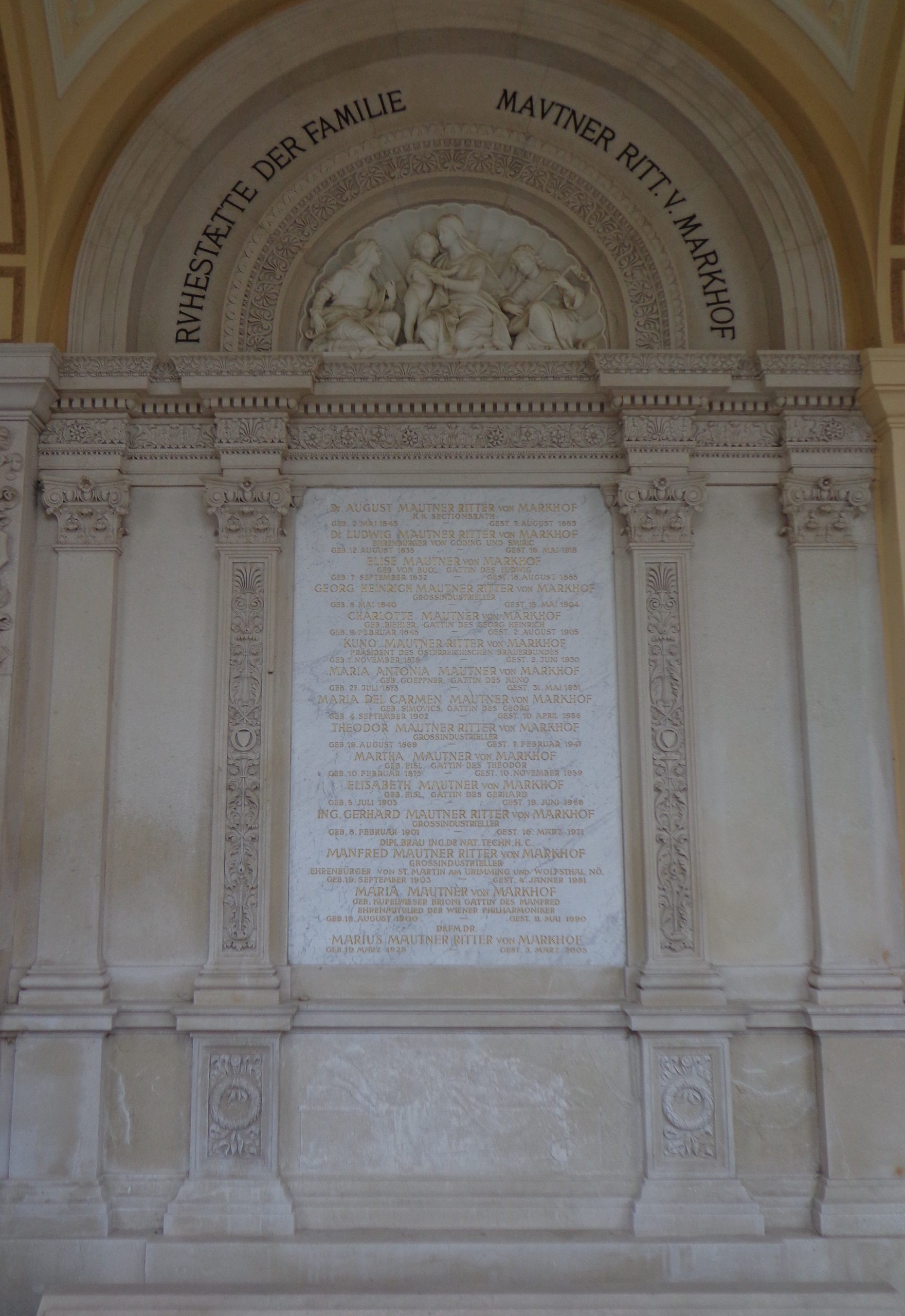 Wiener Zentralfriedhof, Alte Arkaden: Gruft 35: Gräber der Familie von Mautner Markhof